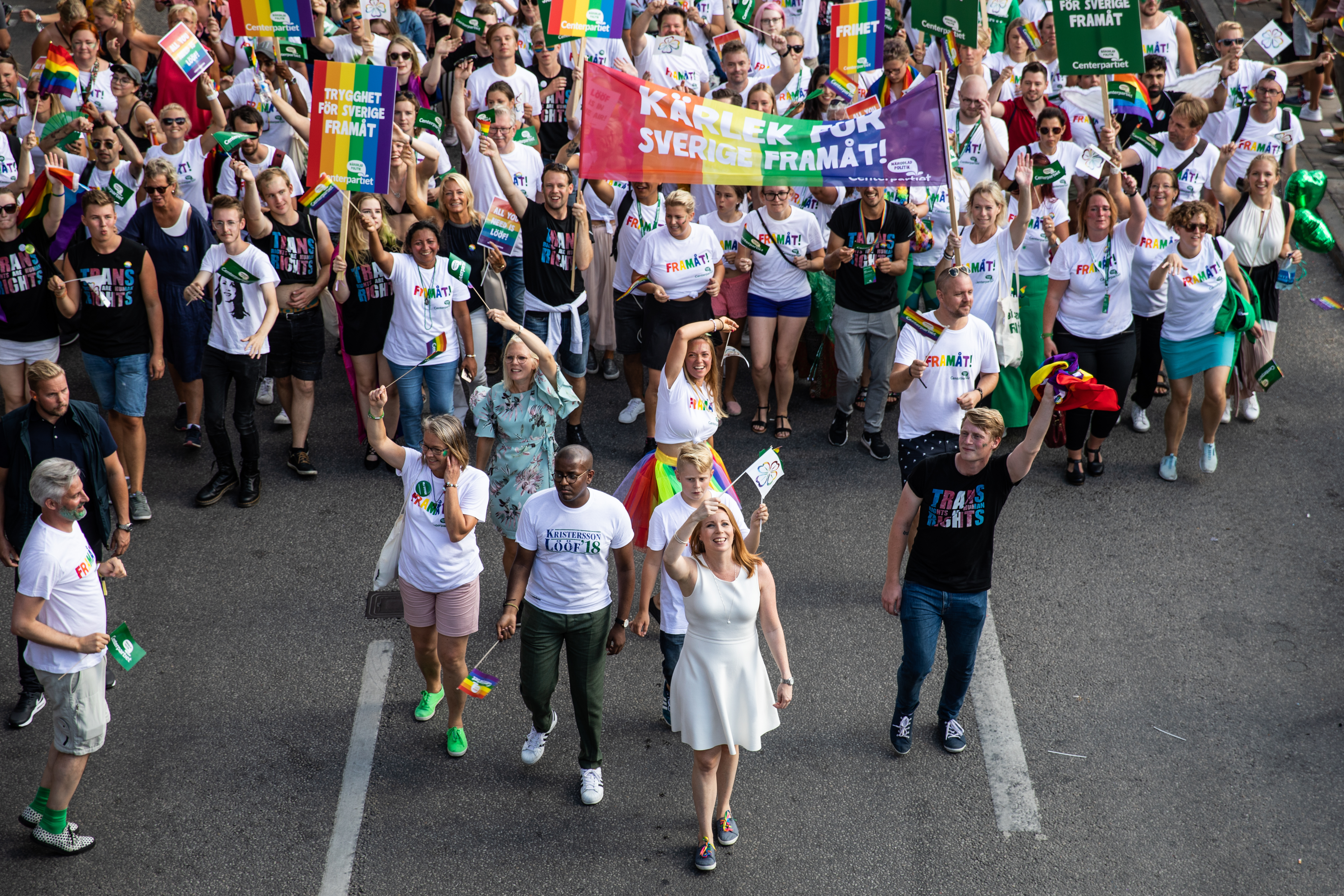 2018-08-04 Prideparaden